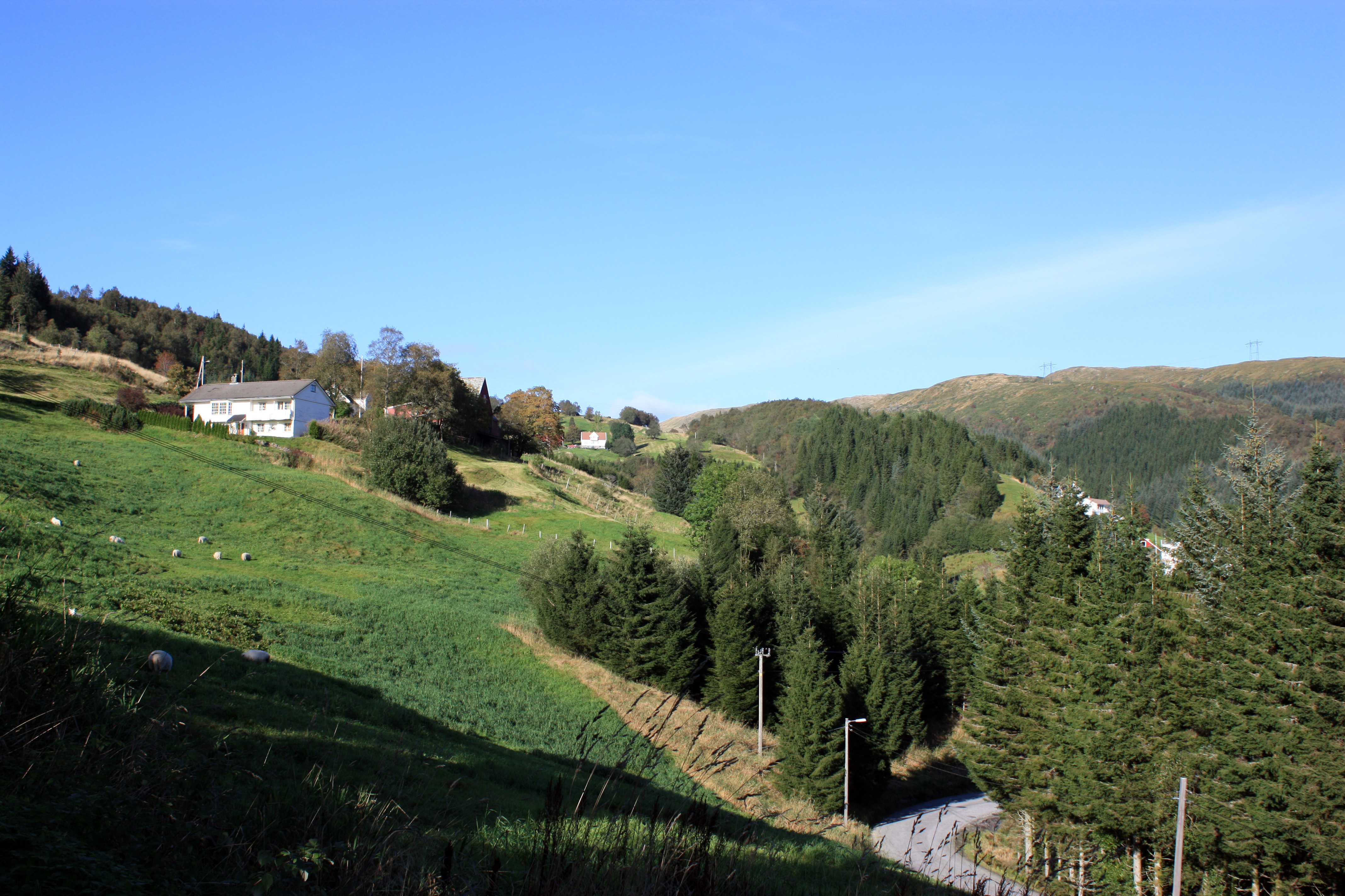 Øvre Totland, Fana, Bergen.